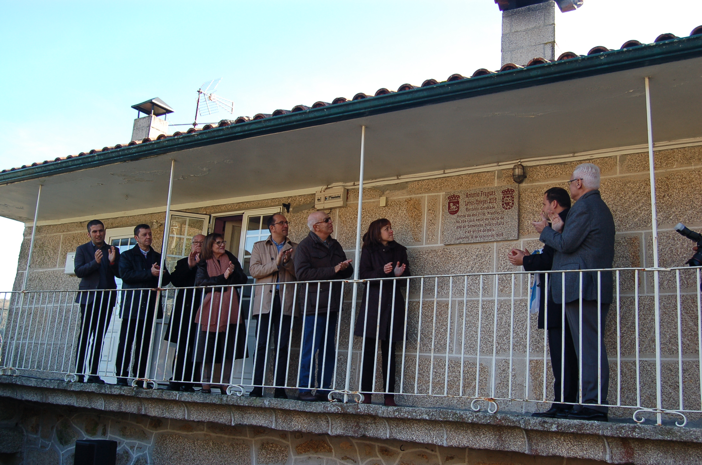 Inauguración dos actos do Día das Letras Galegas 2019 na Casa natal de Antonio Fraguas en Insuela (Loureiro, Cotobade)